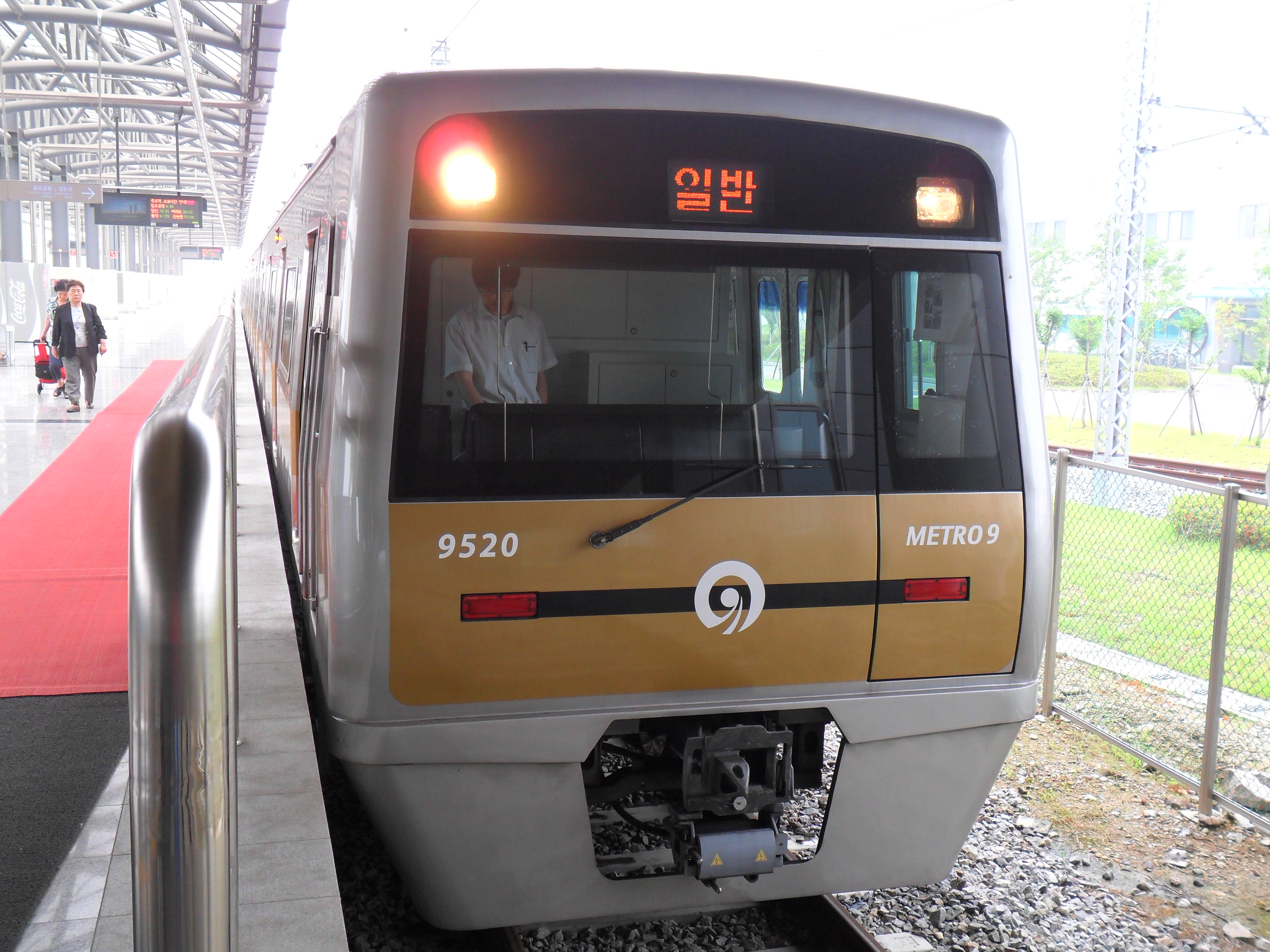 개화역에 대기중인 920편성